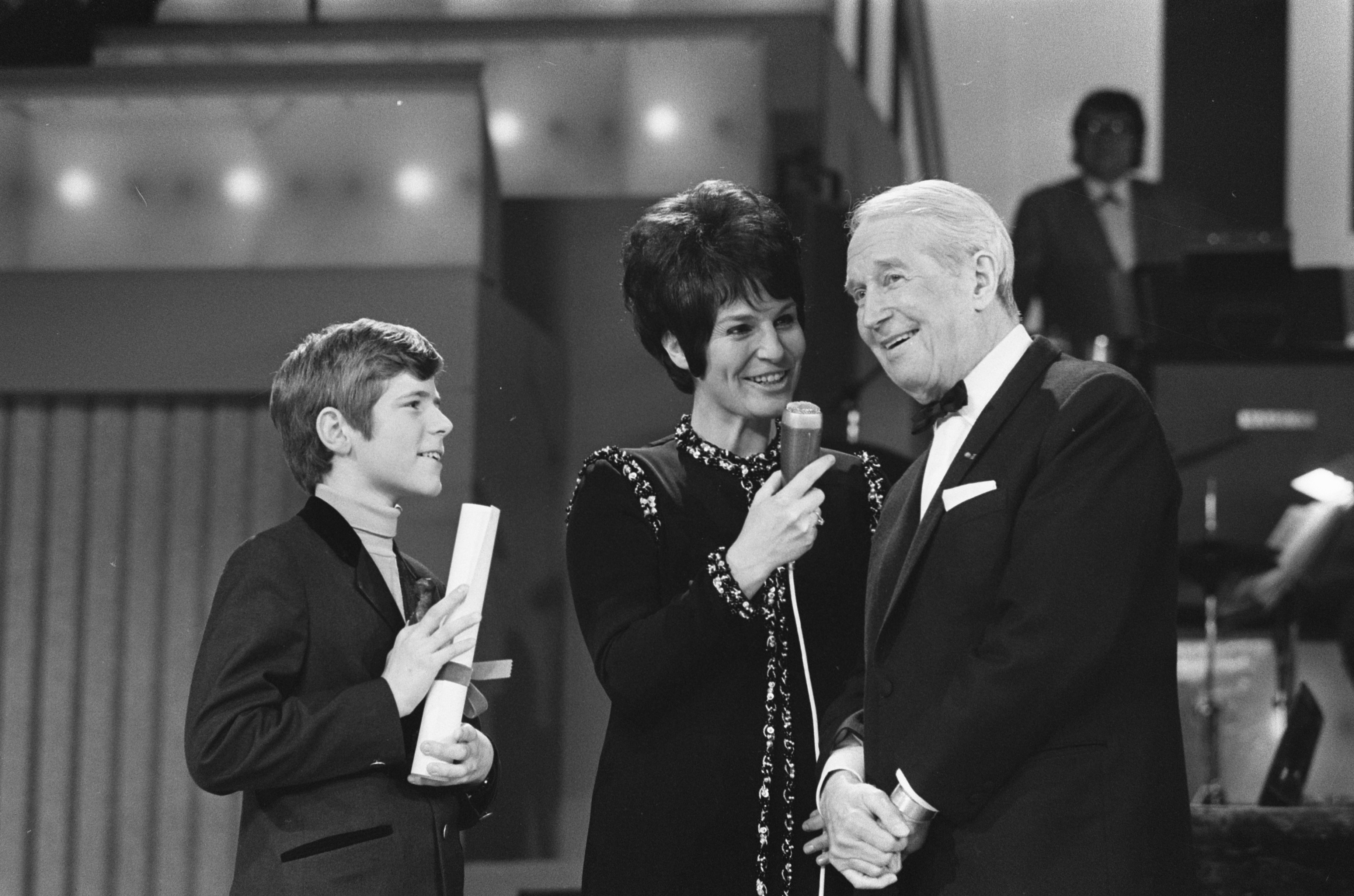 Collectie / Archief : Fotocollectie Anefo Reportage / Serie : [ onbekend ] Beschrijving : Grand Gala du Disque in RAI Amsterdam. Heintje, Mies Bouwman en Maurice Chevalier Datum : 27 februari 1970 Locatie : Amsterdam, Noord-Holland Trefwoorden : acteurs, filmsterren, galavoorstellingen, presentatrices, shows, televisie, zangers Persoonsnaam : Bouwman, Mies, Chevalier Maurice, Heintje Fotograaf : Mieremet, Rob / Anefo Auteursrechthebbende : Nationaal Archief Materiaalsoort : Negatief (zwart/wit) Nummer archiefinventaris : bekijk toegang 2.24.01.05 Bestanddeelnummer : 923-3016